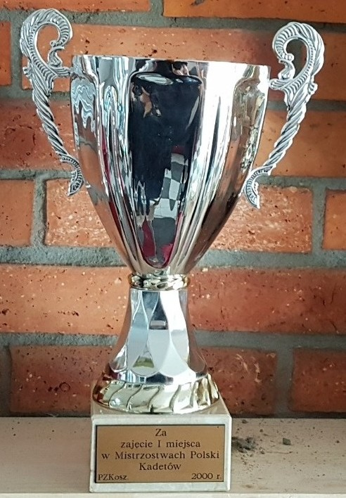 Puchary Spójni Stargard